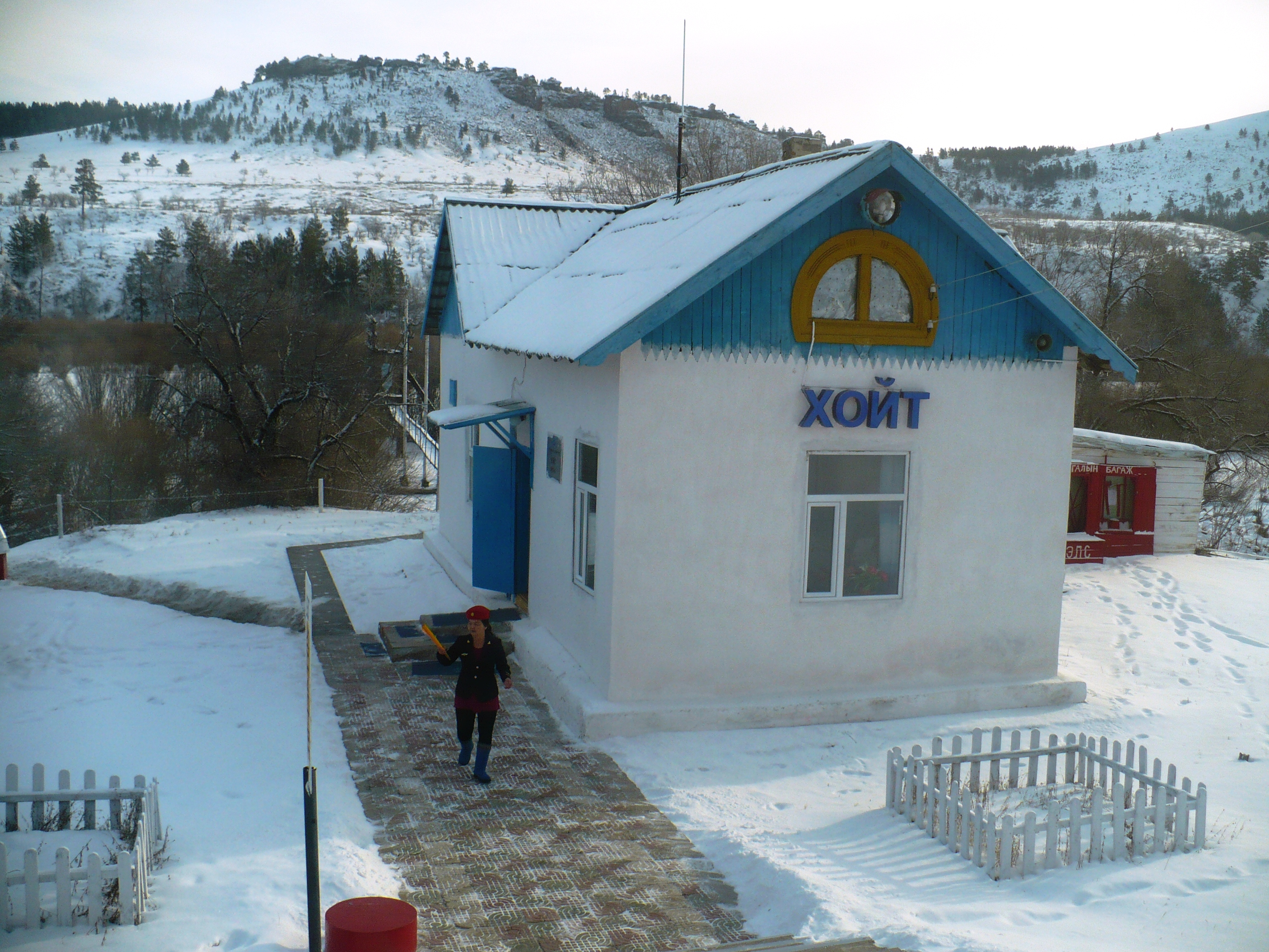 Железнодорожная станция Хойт. Международный пограничный пункт пропуска «Хойт» (MN)